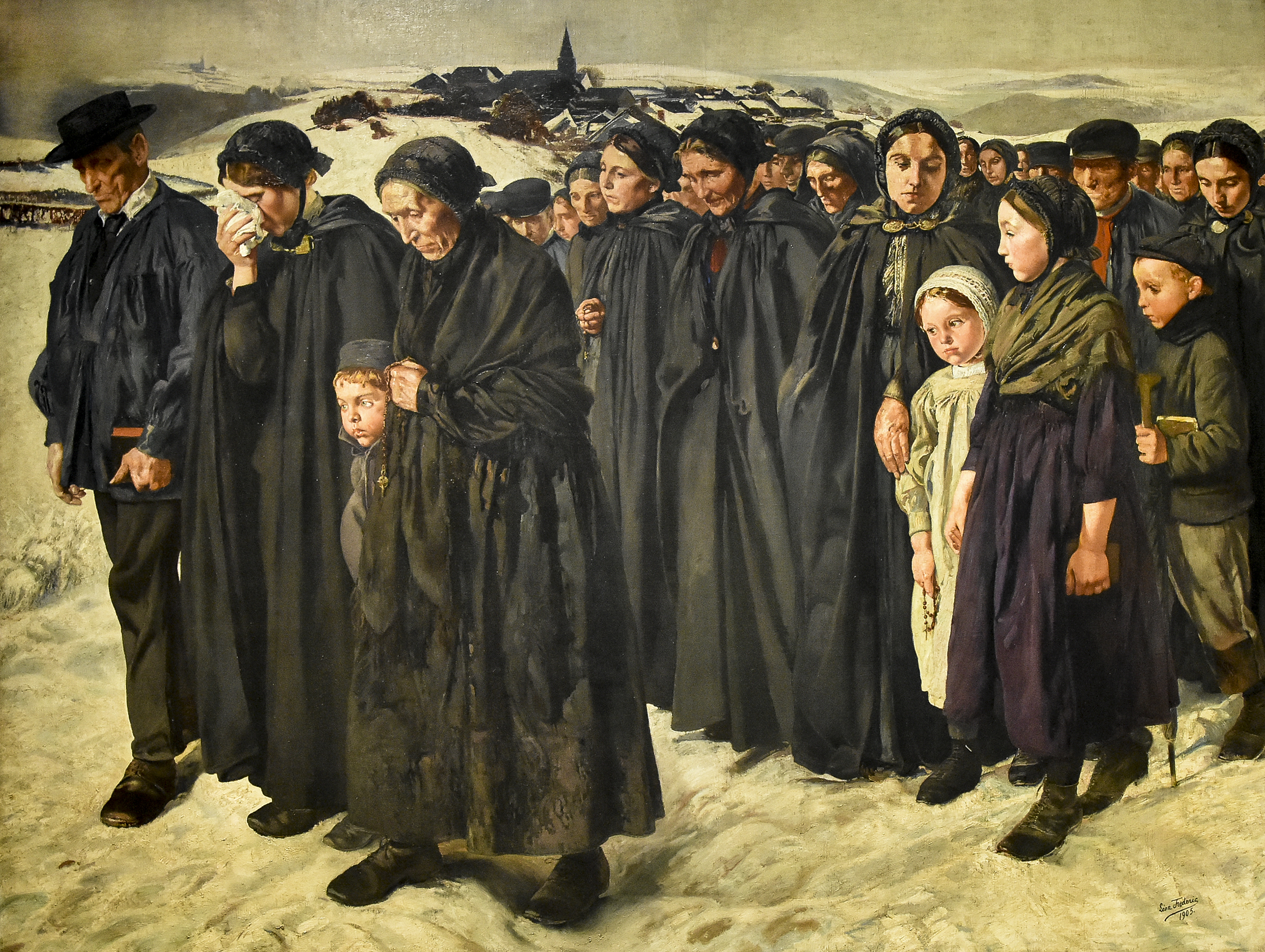 Léon Frédéric (1856-1940) Begrafenis van een boer - La Boverie Luik 23-08-2018 This photo of movable heritage has been taken in the Walloon Region